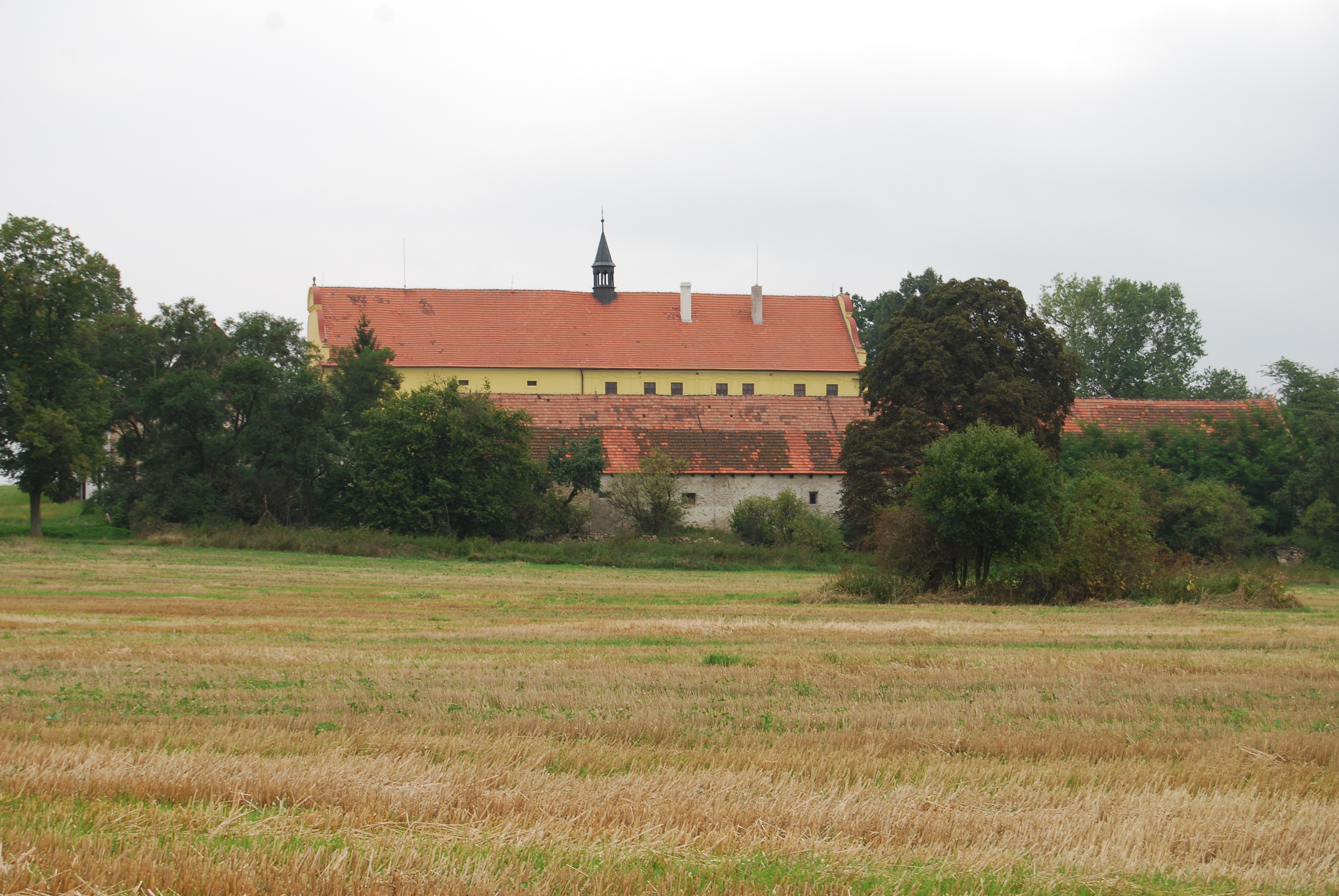 Jenišovice jsou zámeček mezi Milevskem a Dmýšticemi. Přeborov (okres Písek). Česká republika.